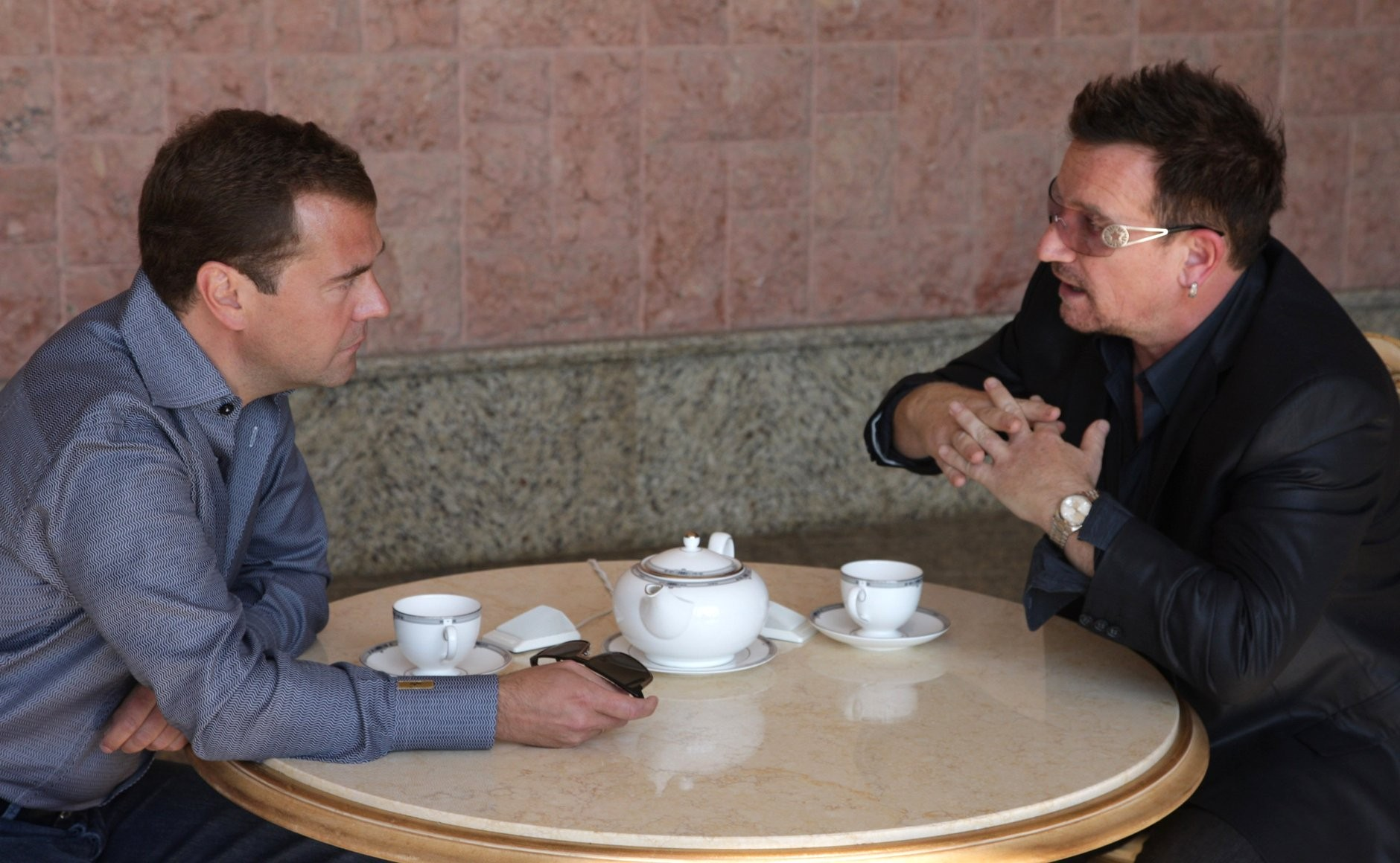 Встреча c лидером ирландской группы «U2» Боно